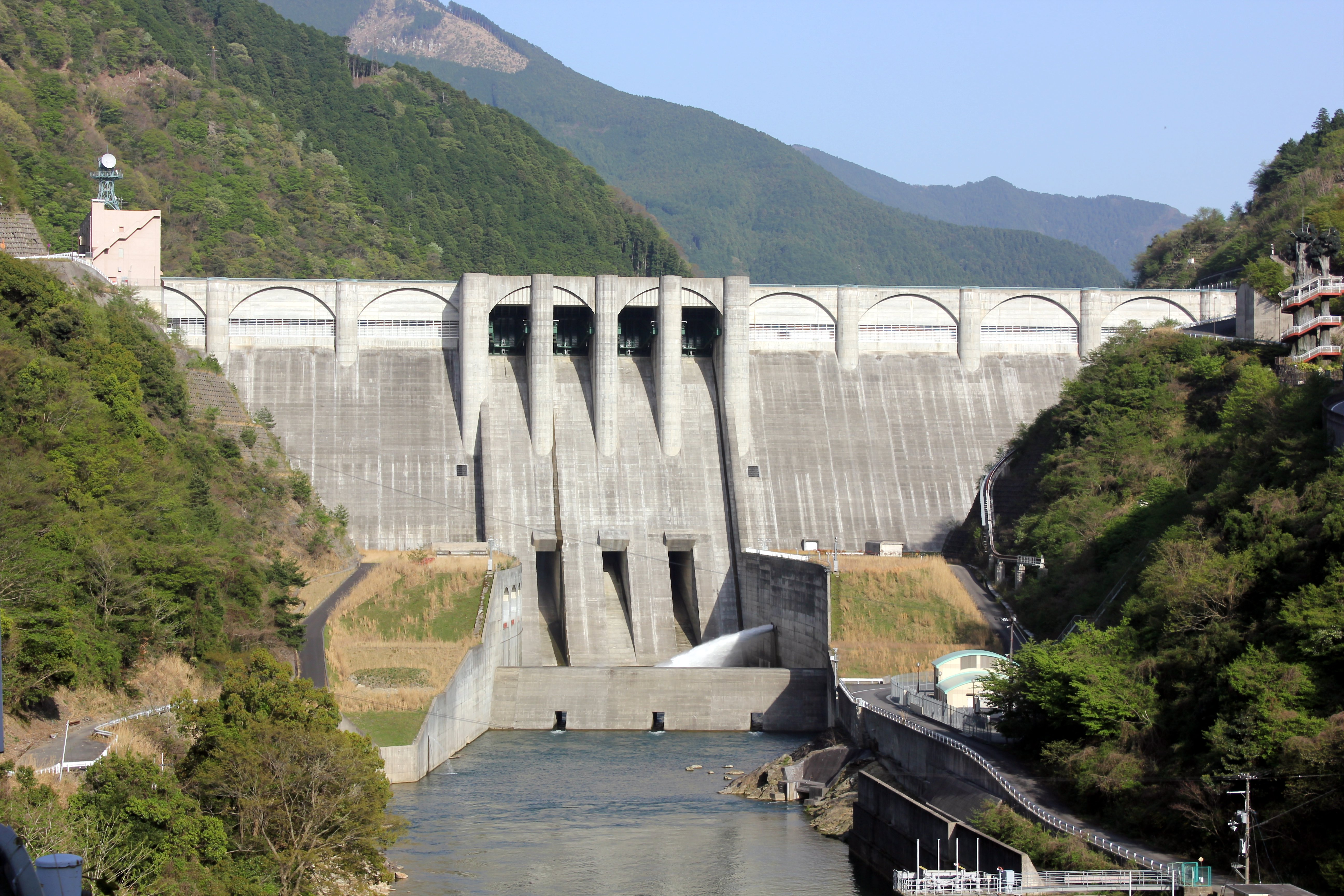 大滝ダム（奈良県吉野郡川上村。紀の川本流。国土交通省管理）